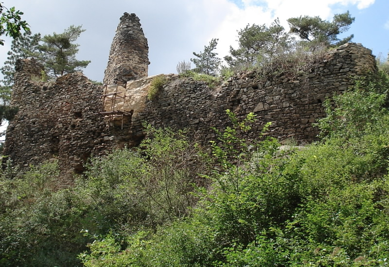 Bok zříceniny hradu Libštejn.